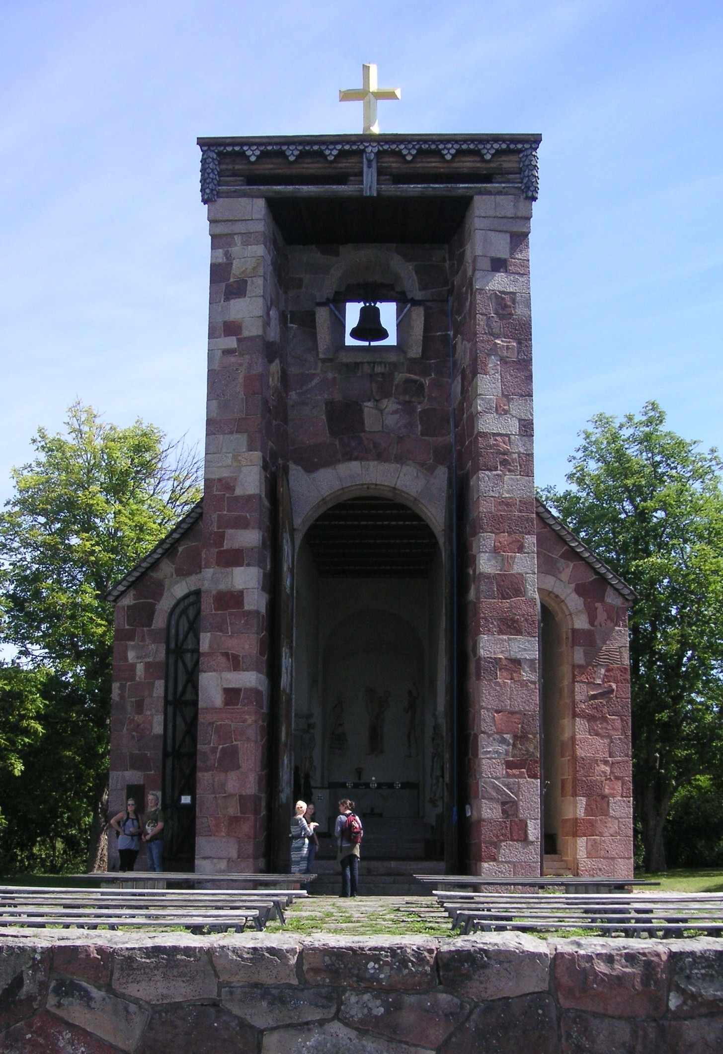 Ansgarskapellet (Björkö kapell) på Björkö